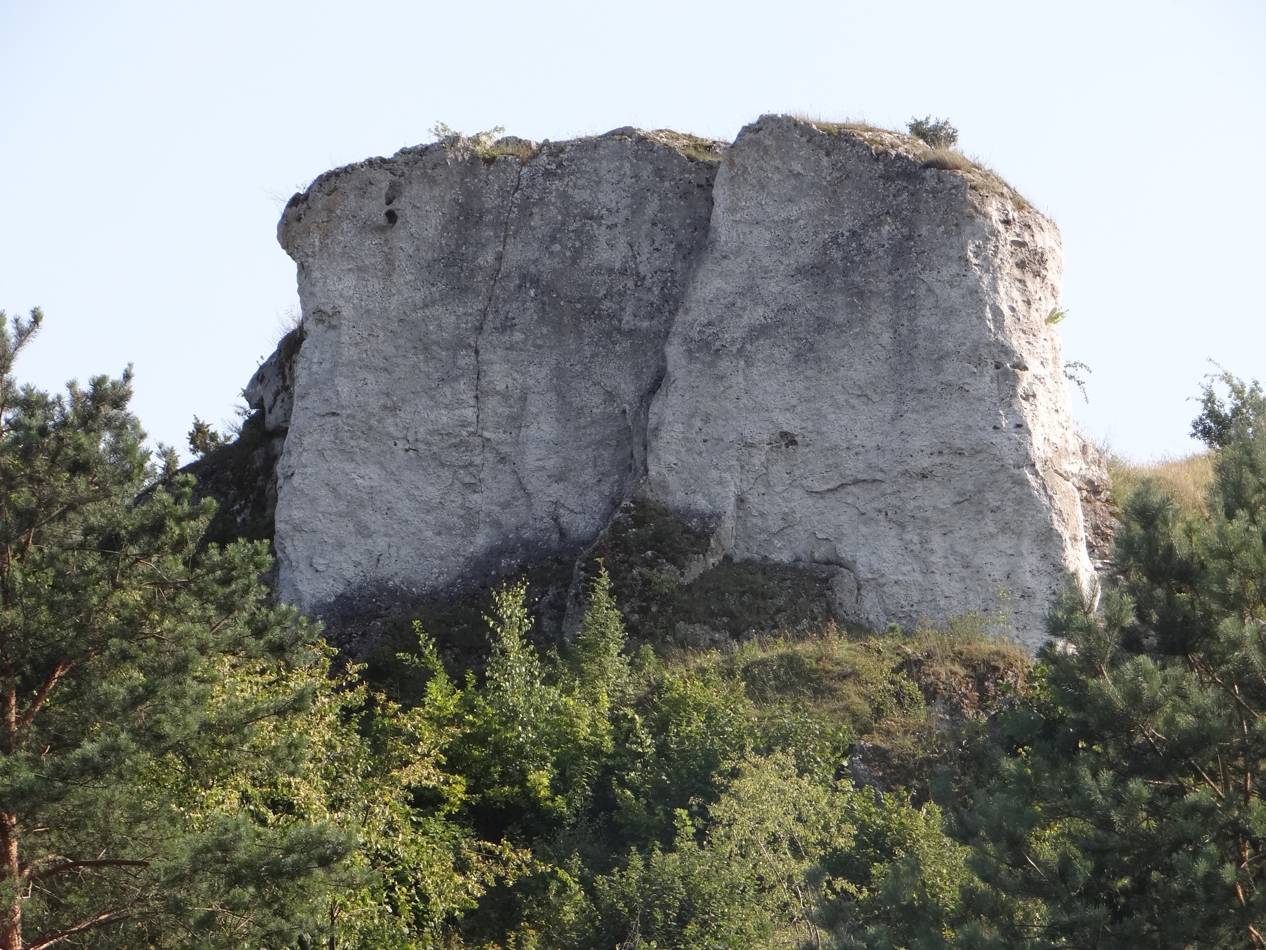 Góry Towarne Duże